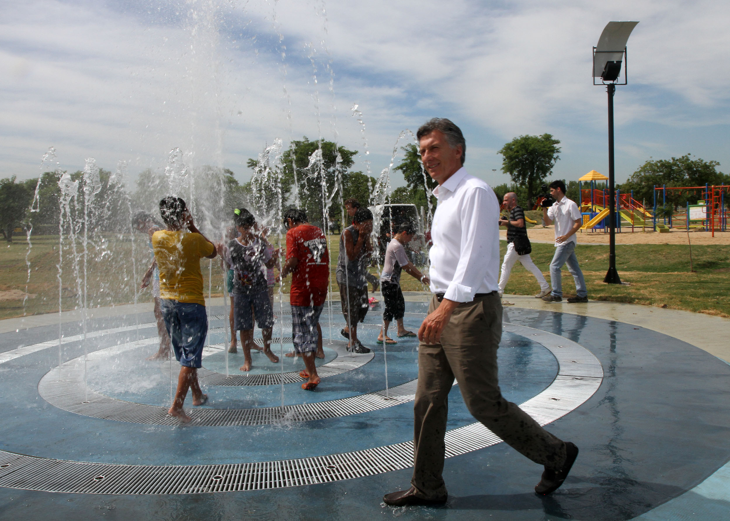 Buenos Aires, 13 de Febrero de 2013. El jefe de Gobierno de la Ciudad de Buenos Aires, Mauricio Macri, presentó hoy los nuevos juegos de agua del Parque Indoamericano, en un acto que compartió con la dirigente social Margarita Barrientos. Fotos: Sandra Hernandez/GCBA